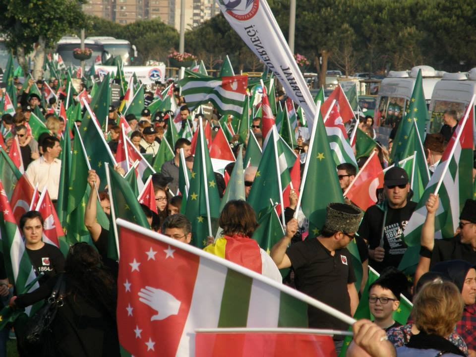 Шествие в Турции 21 мая, посвящённый памятной дате окончания Кавказской войны и последовавшей за ней мухаджирства